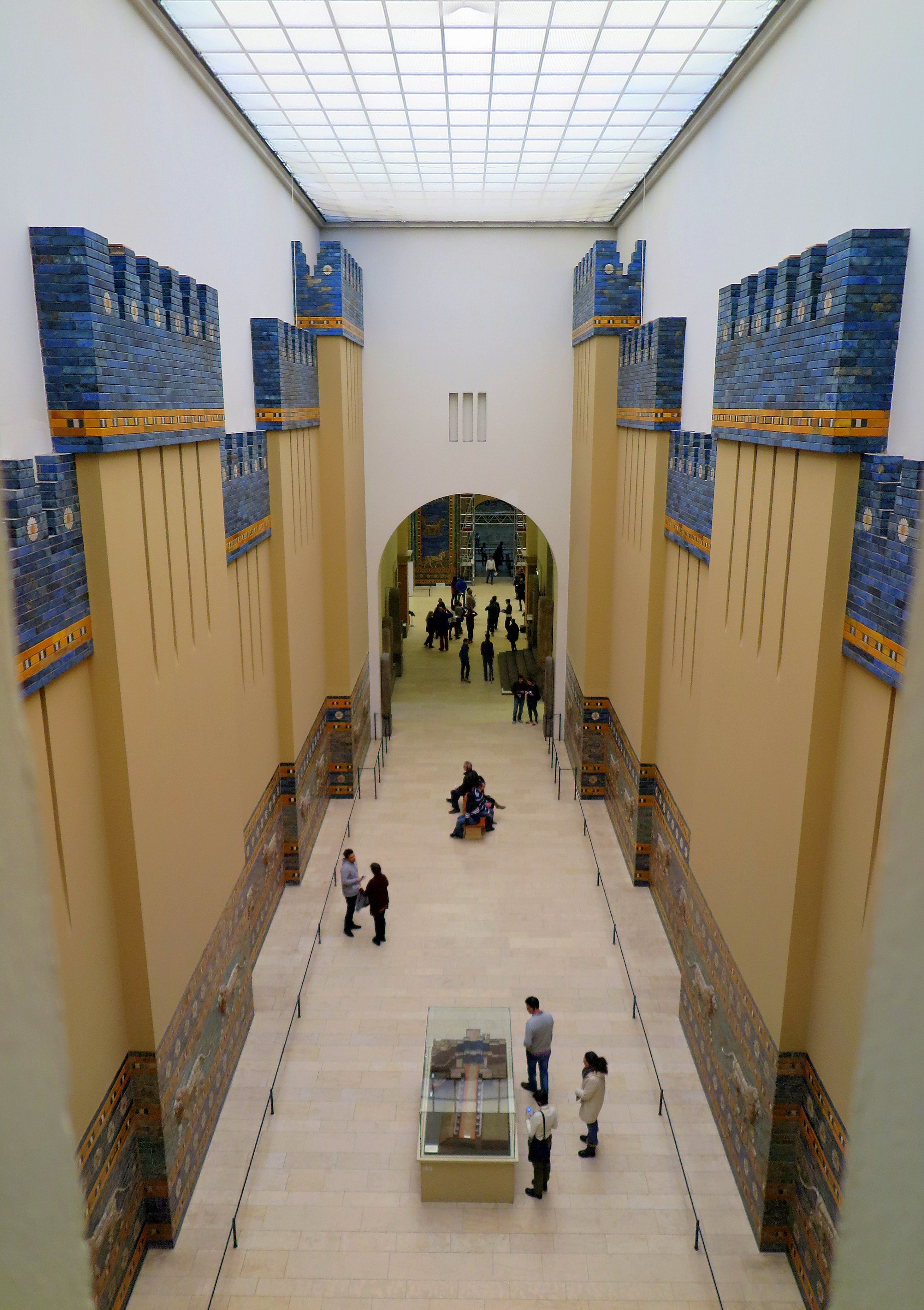 Berlin Pergamonmuseum Prozessionsstraße